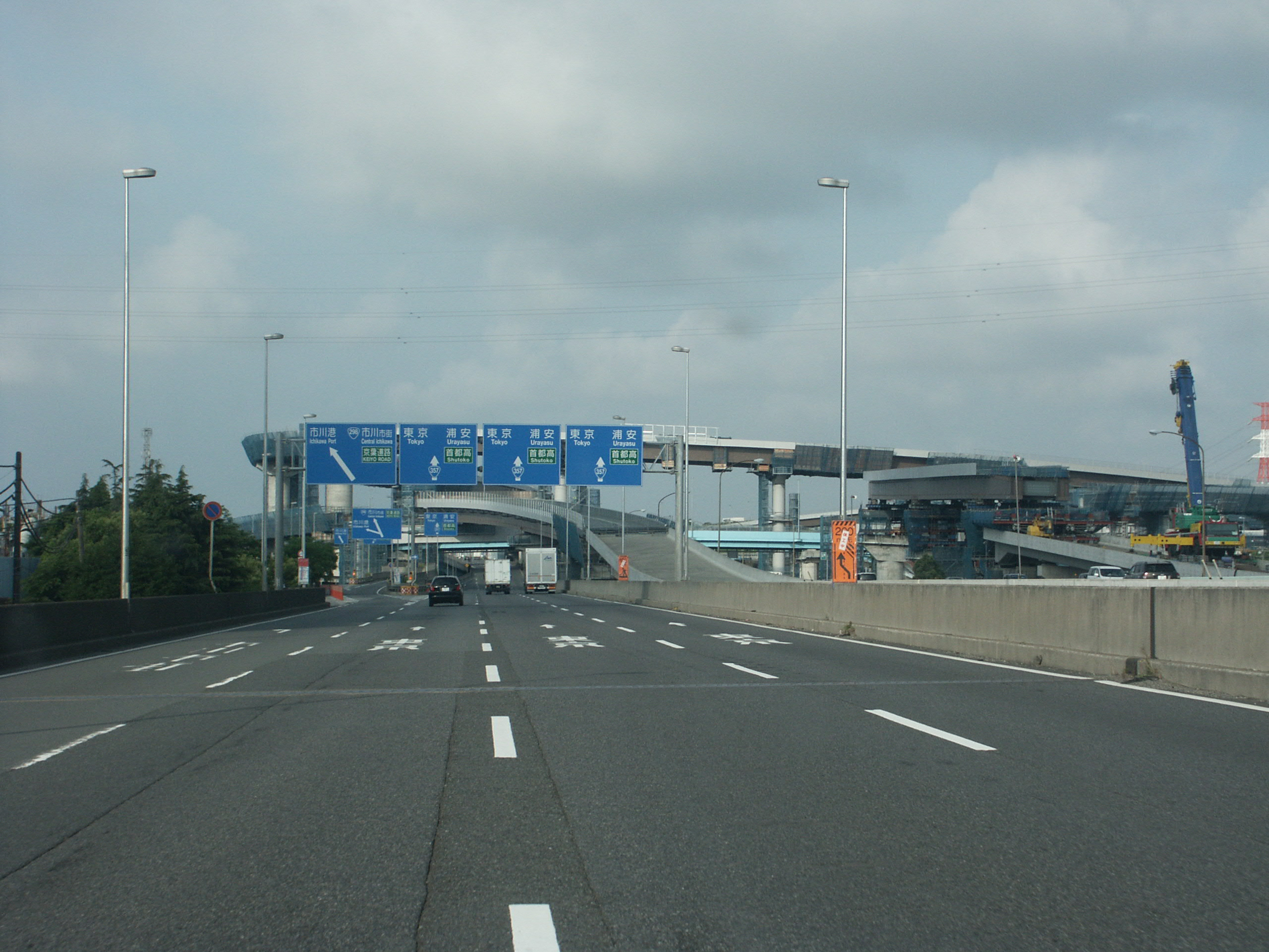 国道357号線千葉県市川市原木付近（高谷ジャンクション方面を撮影）